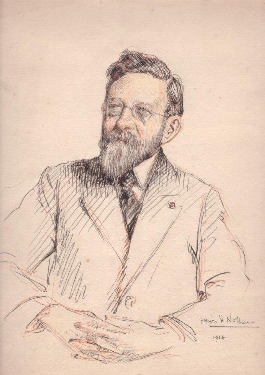 Portrait de famille